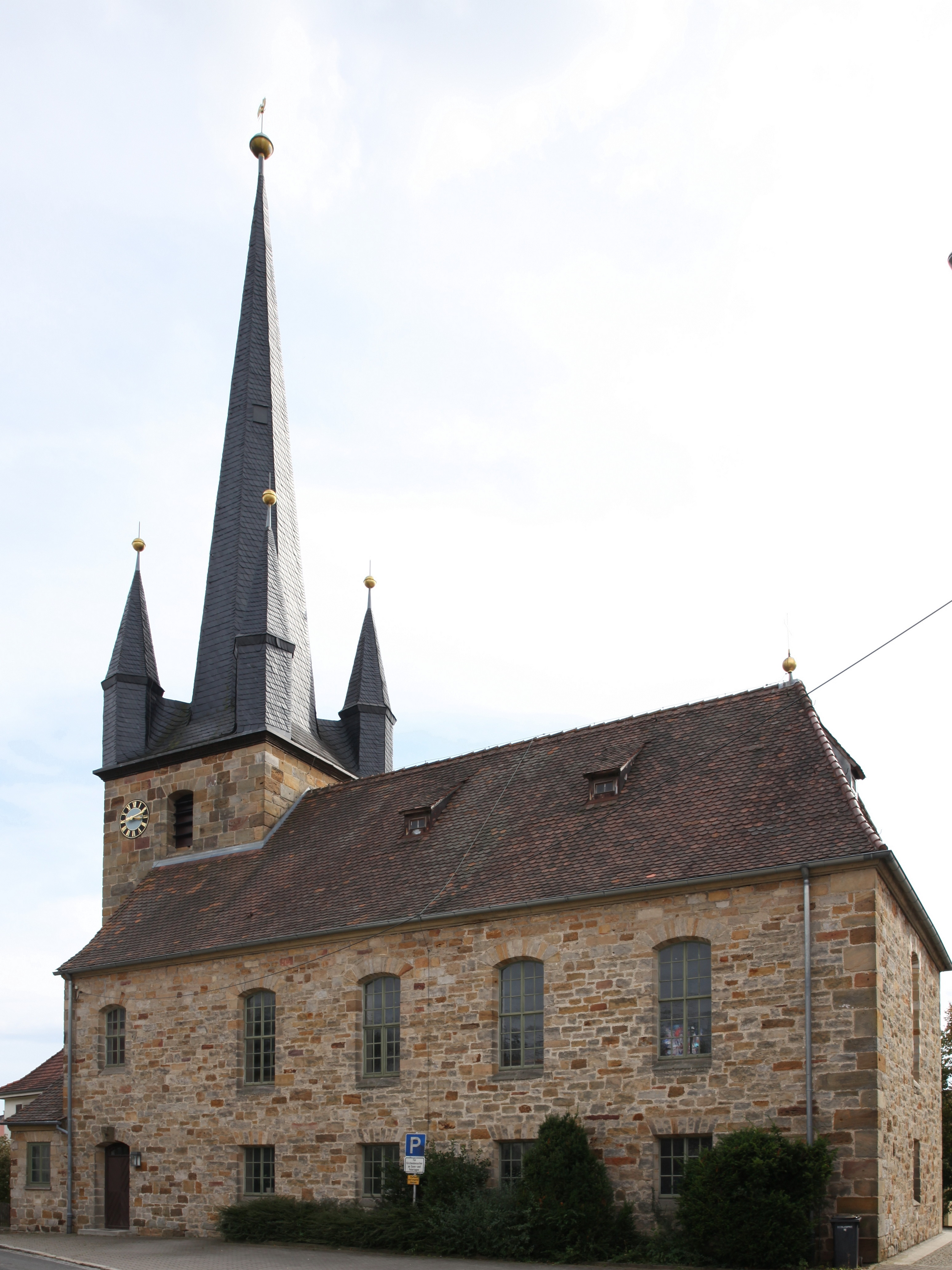 Pfarrkirche St. Laurentius in Ebersdorf bei Coburg